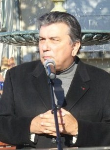 Jean-Paul Fournier, Sénateur-maire de Nîmes lors de l'inauguration de la nouvelle place Saint-Cézaire à Nîmes en décembre 2009.